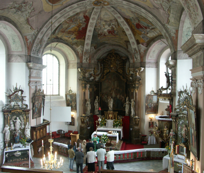 Kościół pw. św. Marcina we wsi Byczeń, woj. dolnośląskie, pow. ząbkowicki.